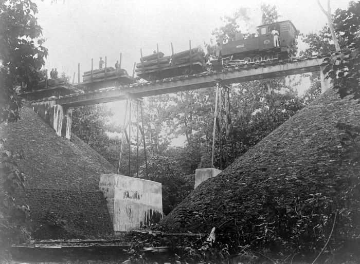 Repronegatief. Brug en een bosrailbaan voor het vervoer van djati, Houtvesterij Tjepoe, Midden Java